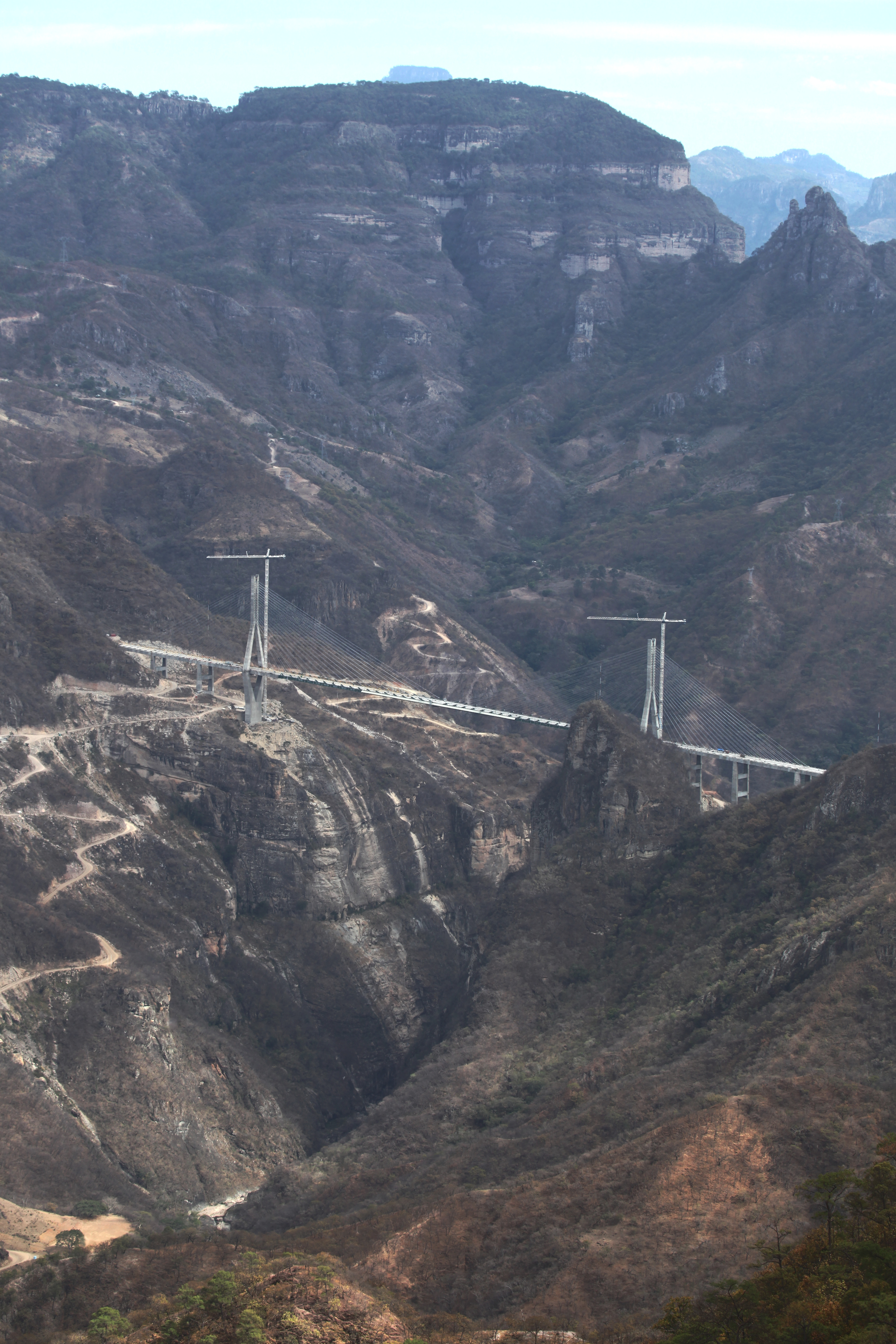 Puente Baluarte, Mexico